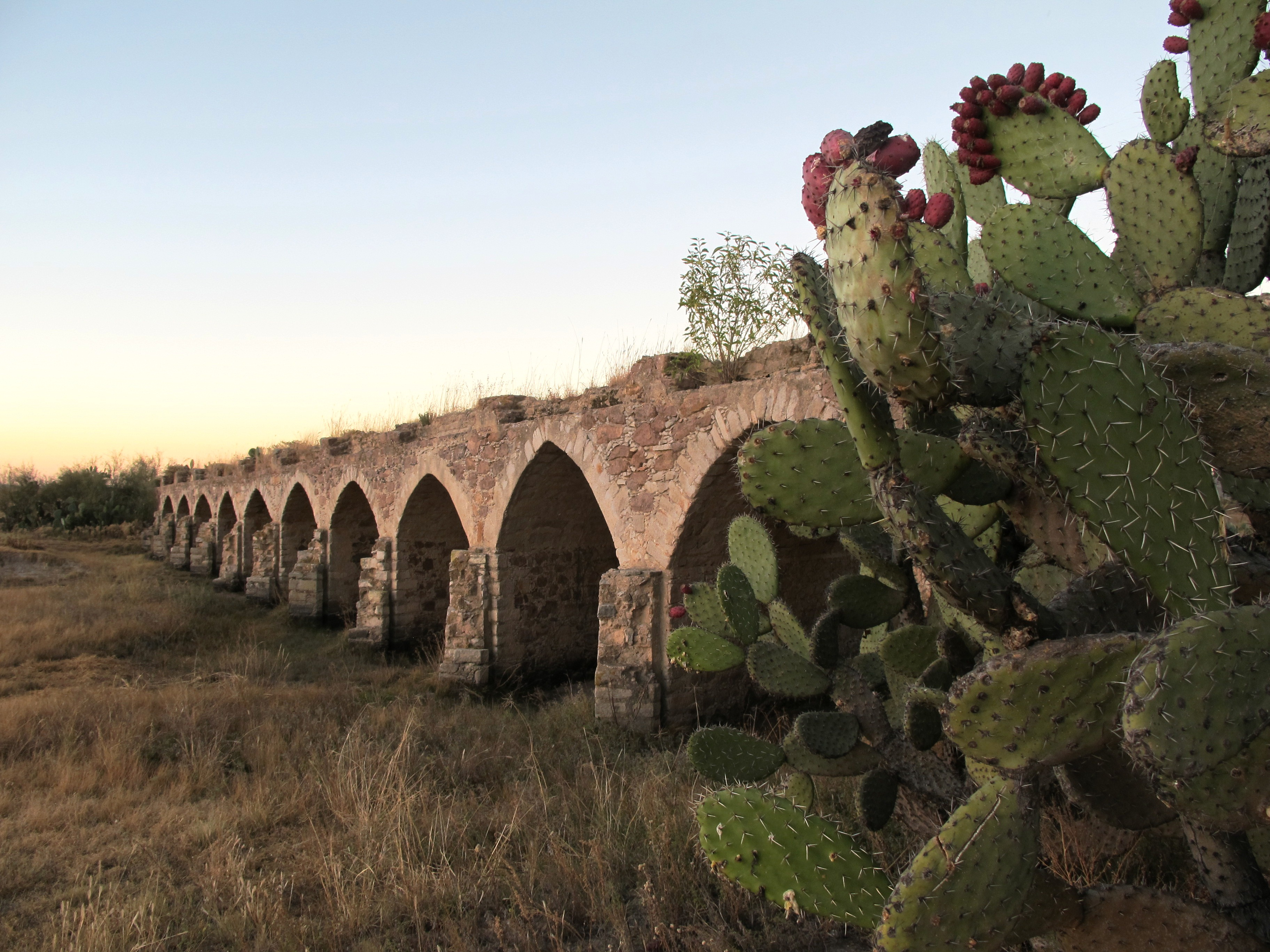 Puente del siglo XVII en el tramo del Camino Real antes del Presidio de Ojuelos.